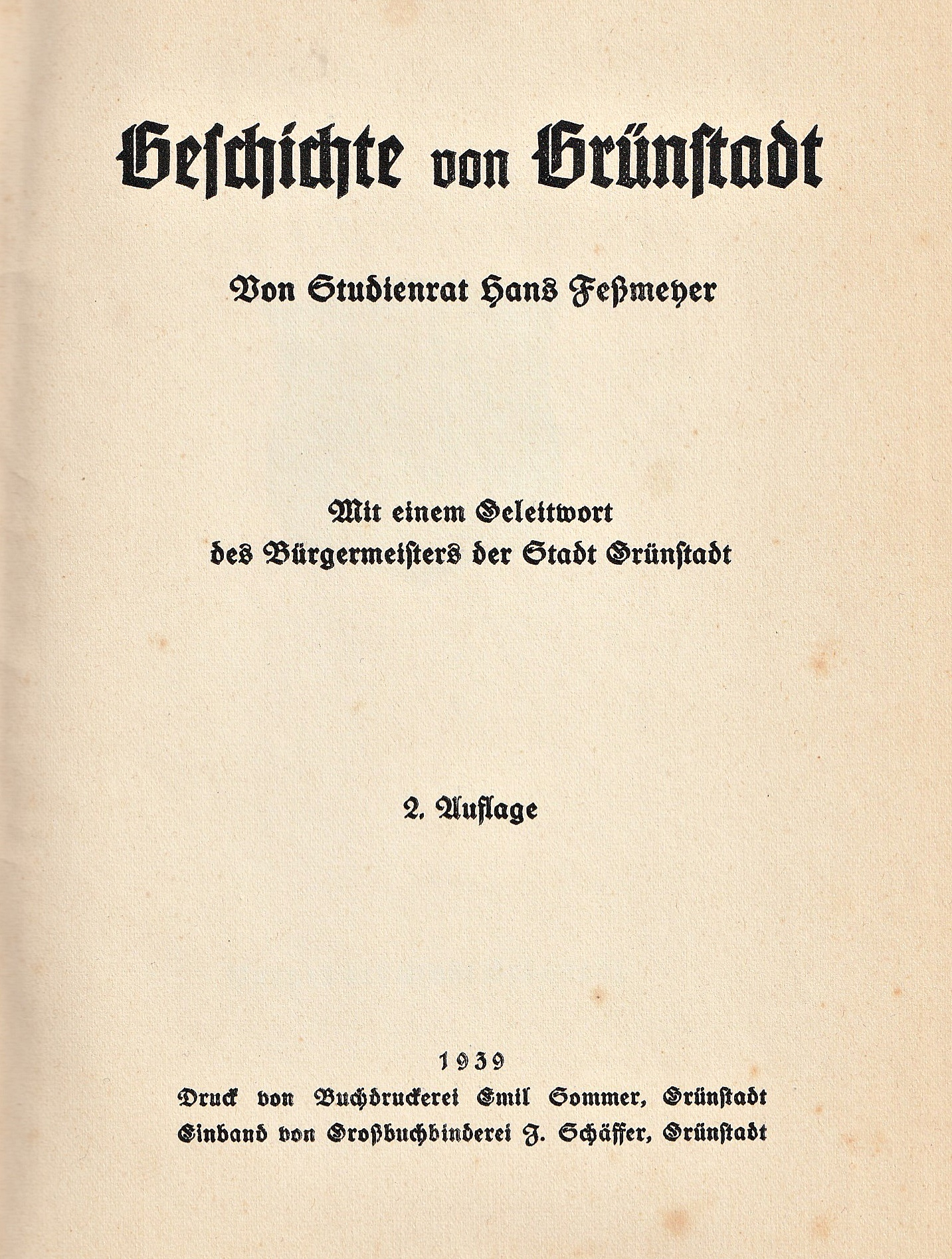 Hans Feßmeyer Titelblatt "Geschichte von Grünstadt", 1939 (eigener Scan vom eigenen alten Buch)